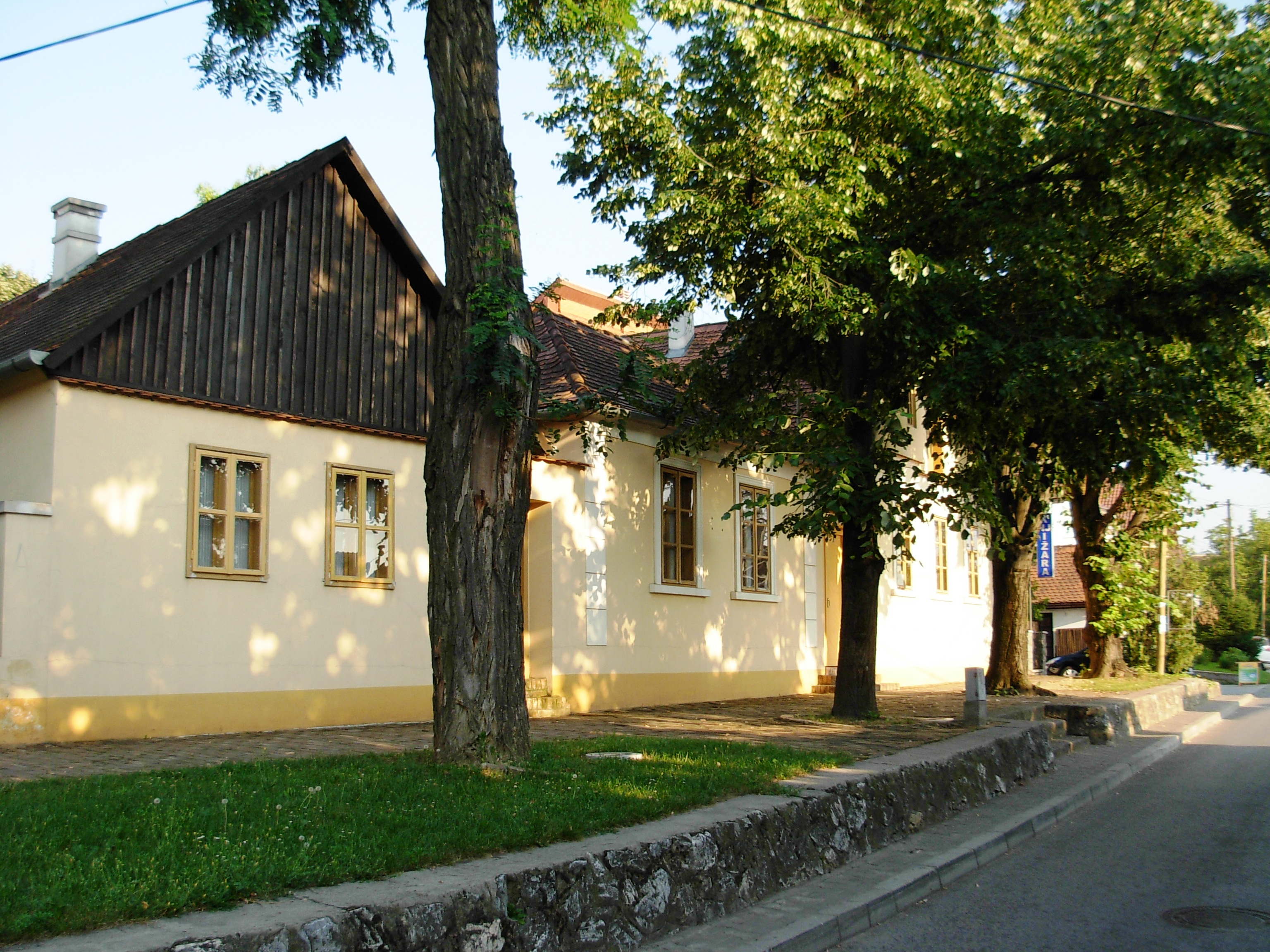 Zmajev muzej u Sremskoj Kamenici.